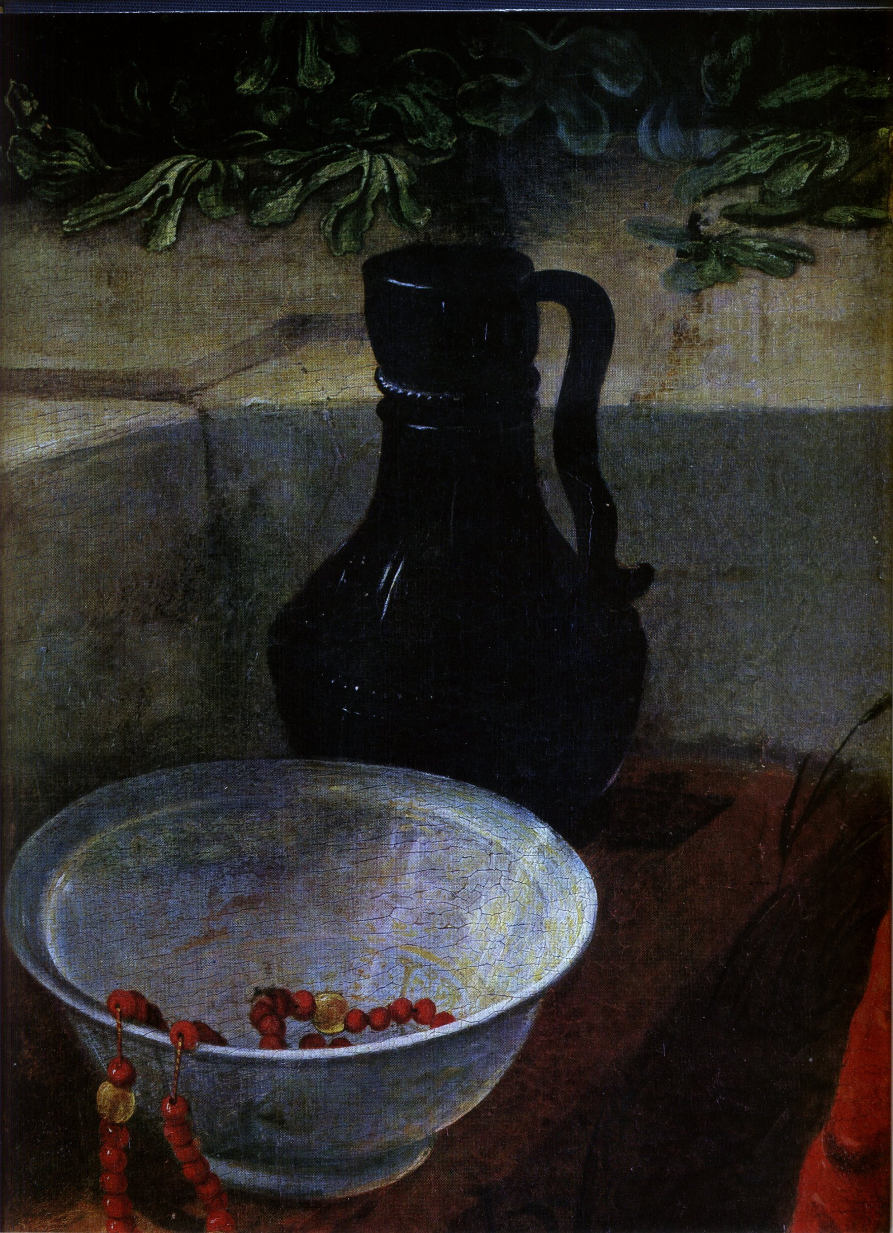 Stuppacher Madonna, Detail: Krug und Schale mit Rosenkranz